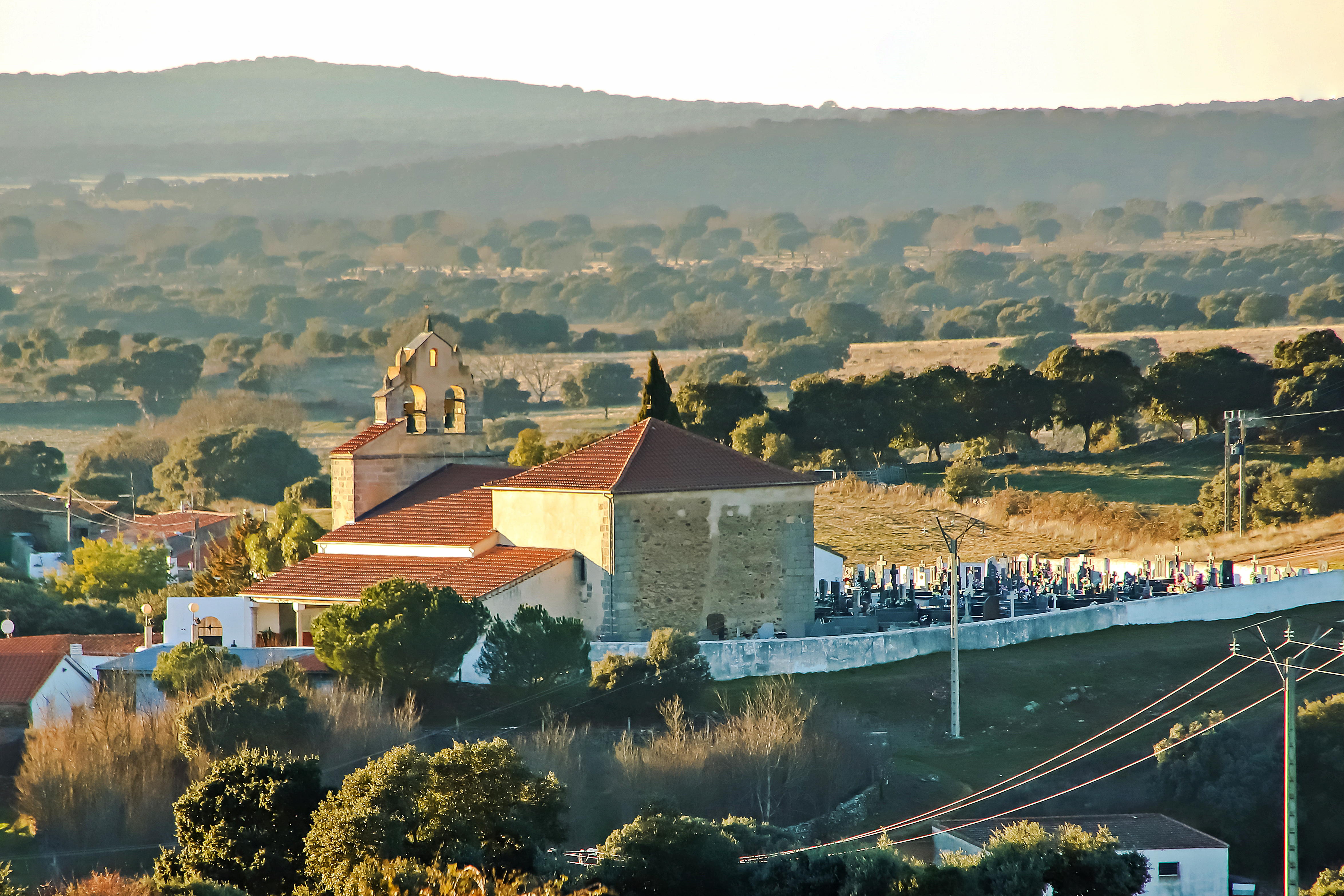 Frades de la Sierra municipio de la comarca de Entresierras, en la provincia de Salamanca